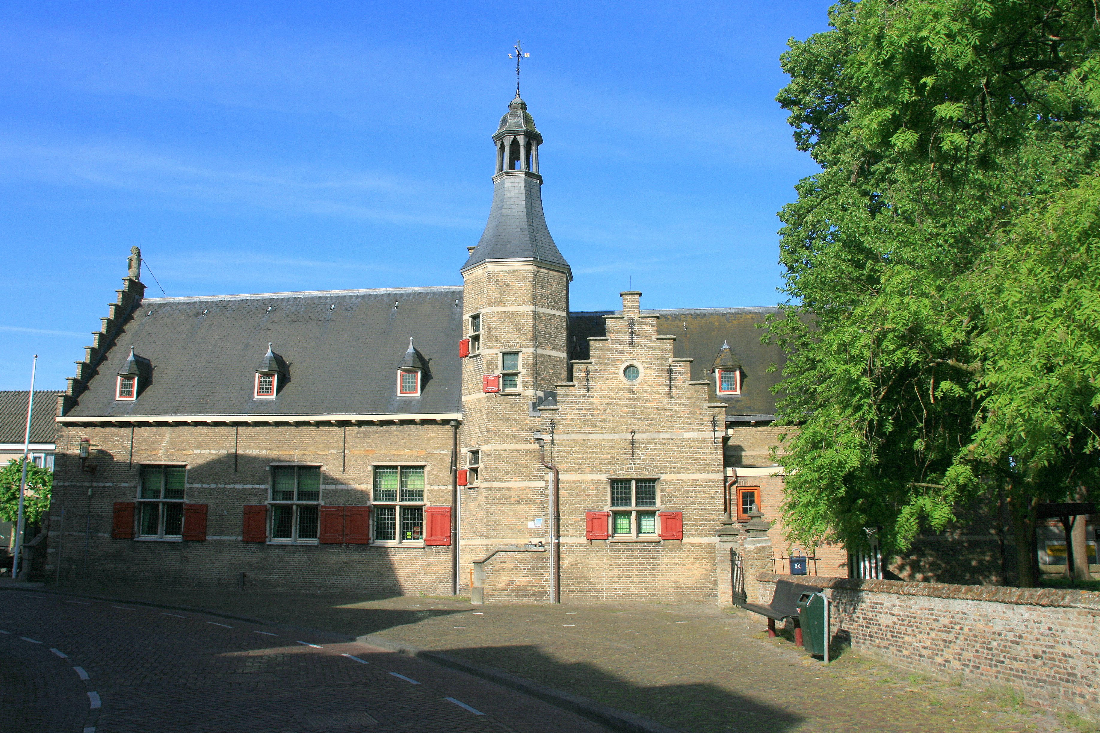 Het voormalige Raadhuis van Halsteren, aan Dorpsstraat 22, werd gebouwd in 1633. Het werd opgetrokken in baksteen met natuurstenen banden en voorzien van een zadeldak tussen trapgevels. In de 18e en 19e eeuw vonden verbouwingen plaats, maar in 1917 werd het gebouw gerestaureerd en uitgebreid, waarbij onder meer het bordes met leeuwen werd gereconstrueerd